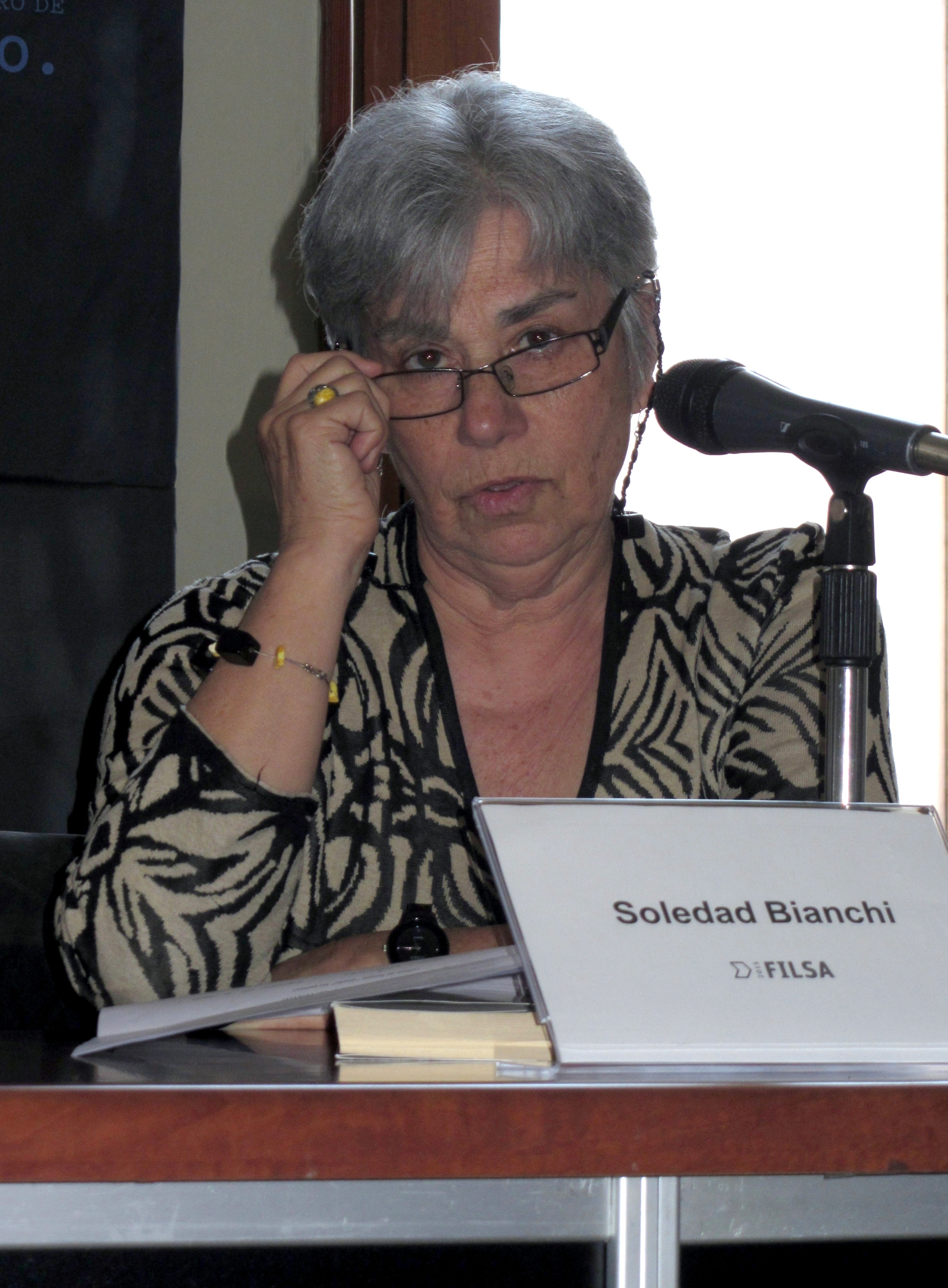 La crítico literaria chilena Soledad Bianchi en la Feria Internacional del Libro de Santiago 2015